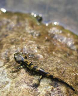 סלמנדרה מצויה צעירה מיד לאחר המטמורפוזה והיציאה מהבריכה